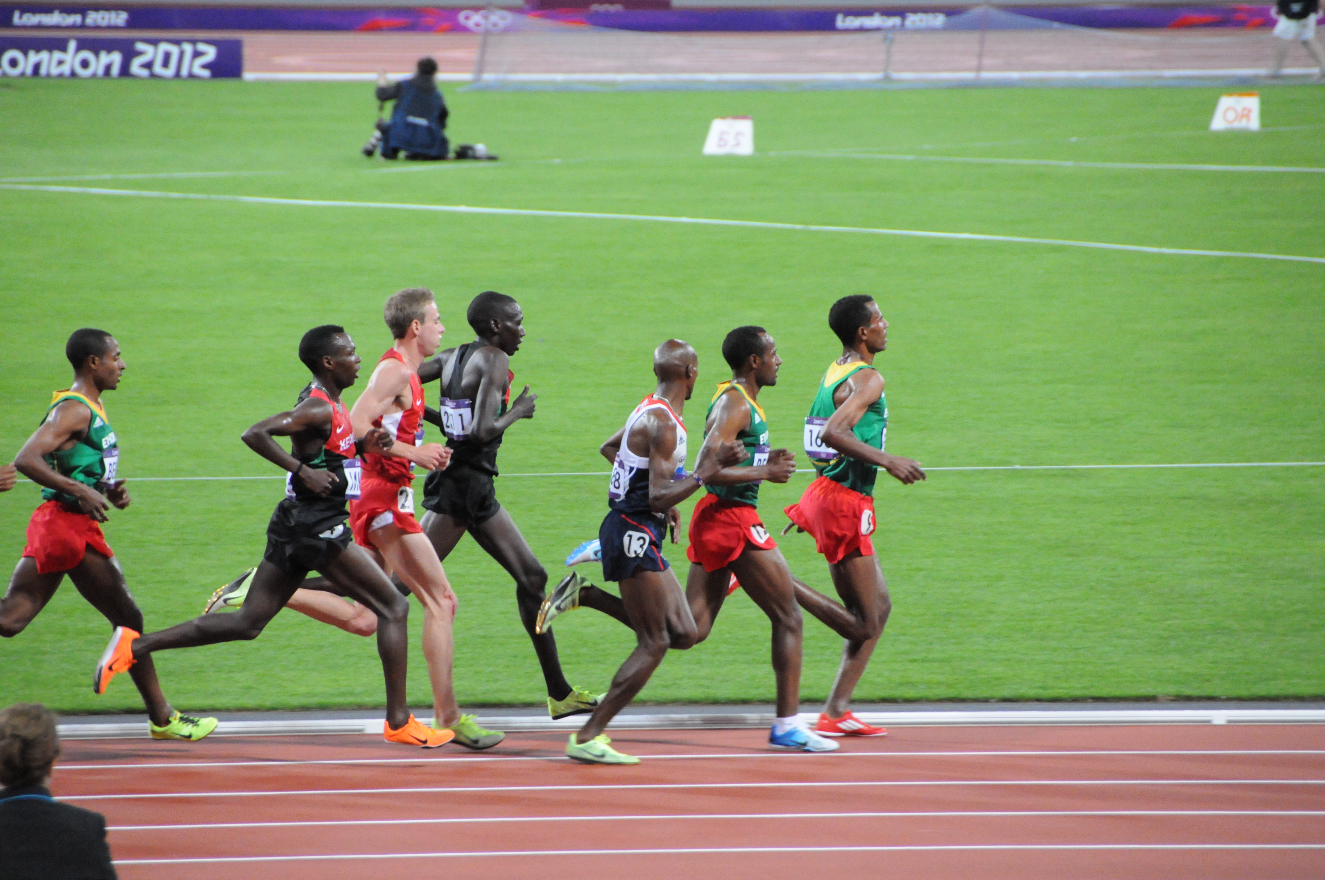 Course du 10000 m au stade olympique de Londres, Kenenisa Bekele, Bedan Karoki Muchiri, Galen Rupp, Moses Ndiema Masai, Mo Farah, Tariku Bekele, Gebregziabher Gebremariam